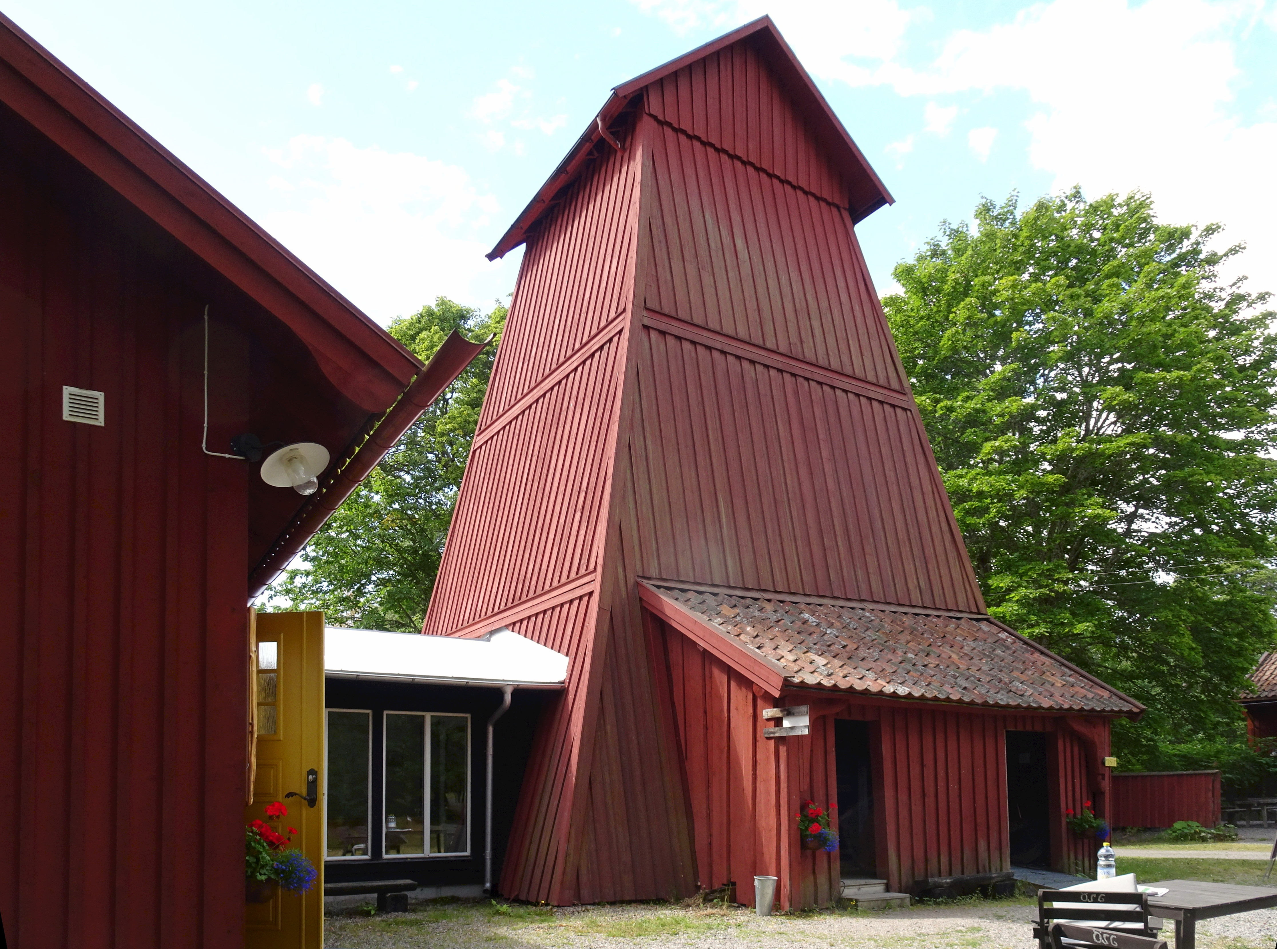 Skottvågns gruva